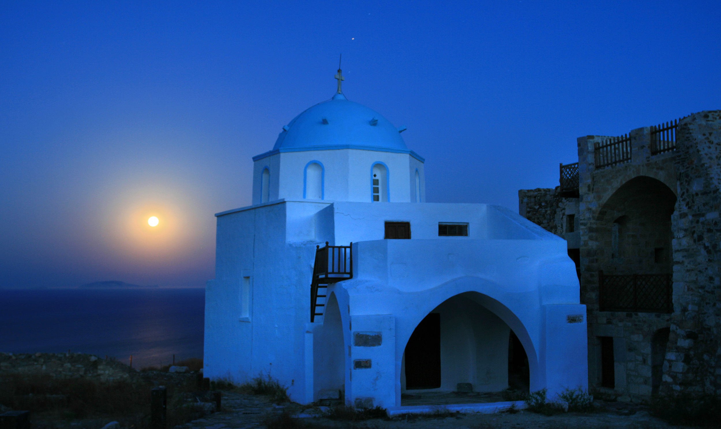 Κάστρο Αστυπάλαιας«Κάστρο Αστυπάλαιας»